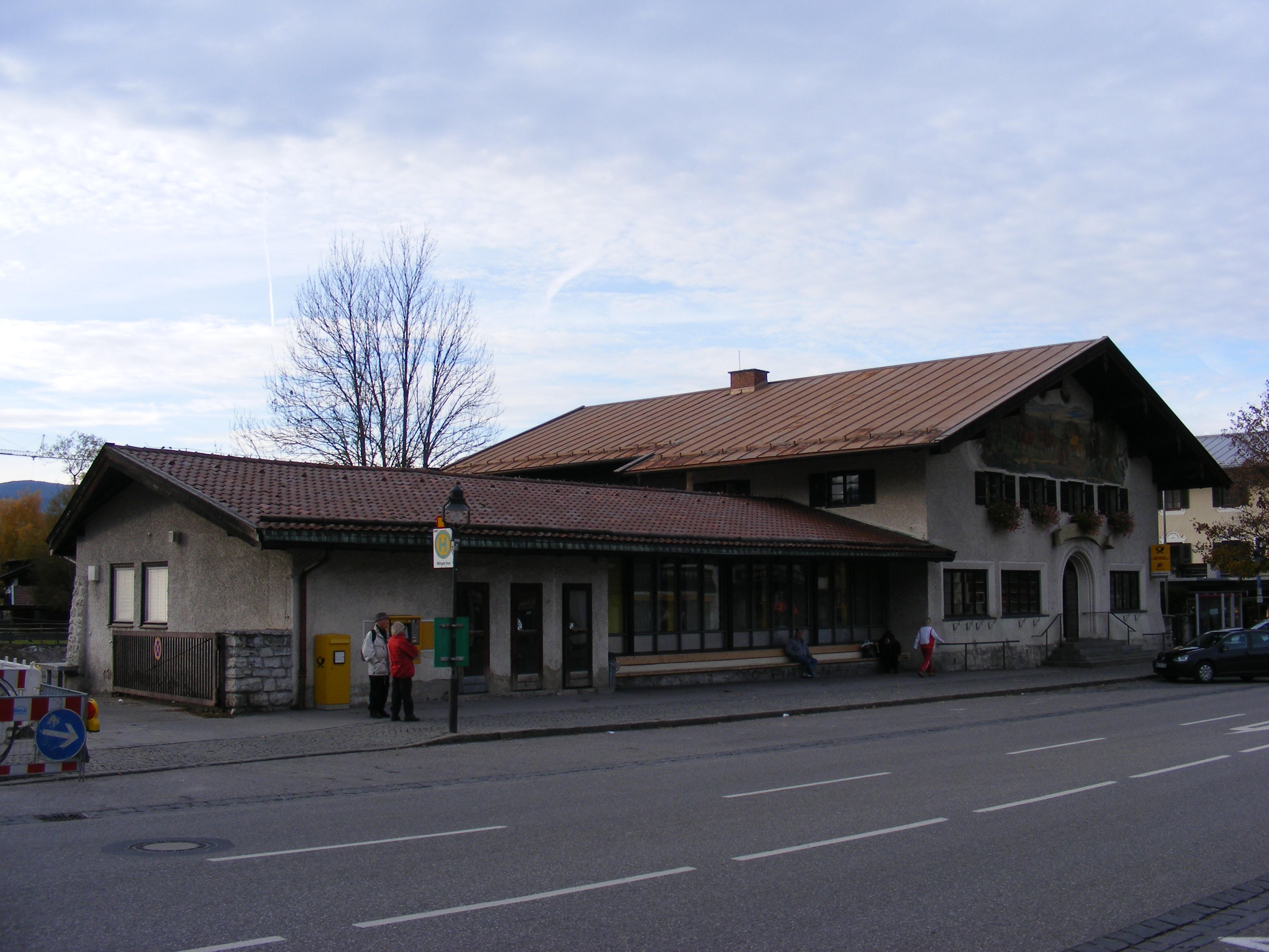 Nördliche Hauptstraße 11, Rottach-Egern, Landkreis Miesbach, Bayern, Germany